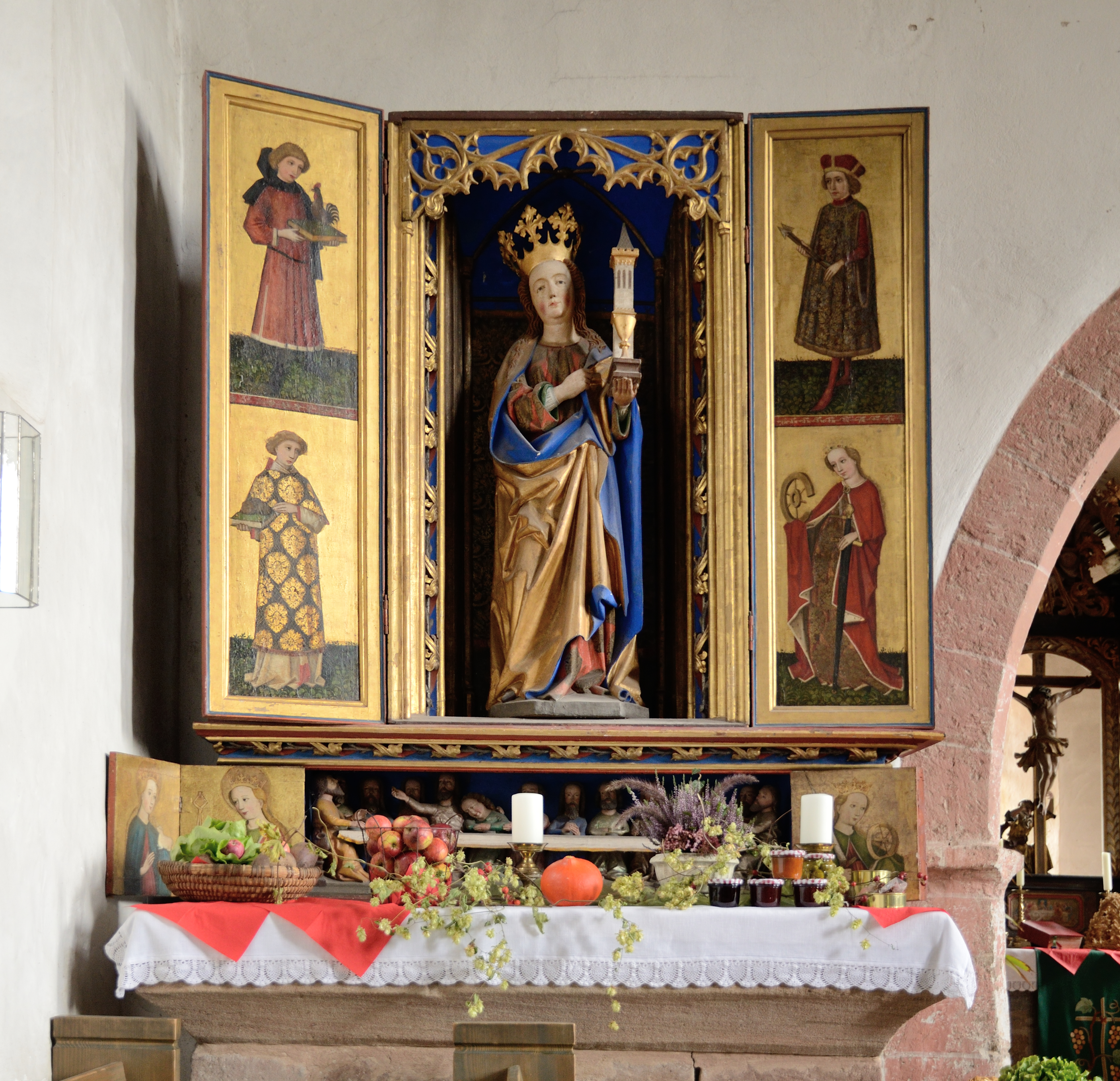 St. Veitskirche (Veitsbronn); Barbaraaltar